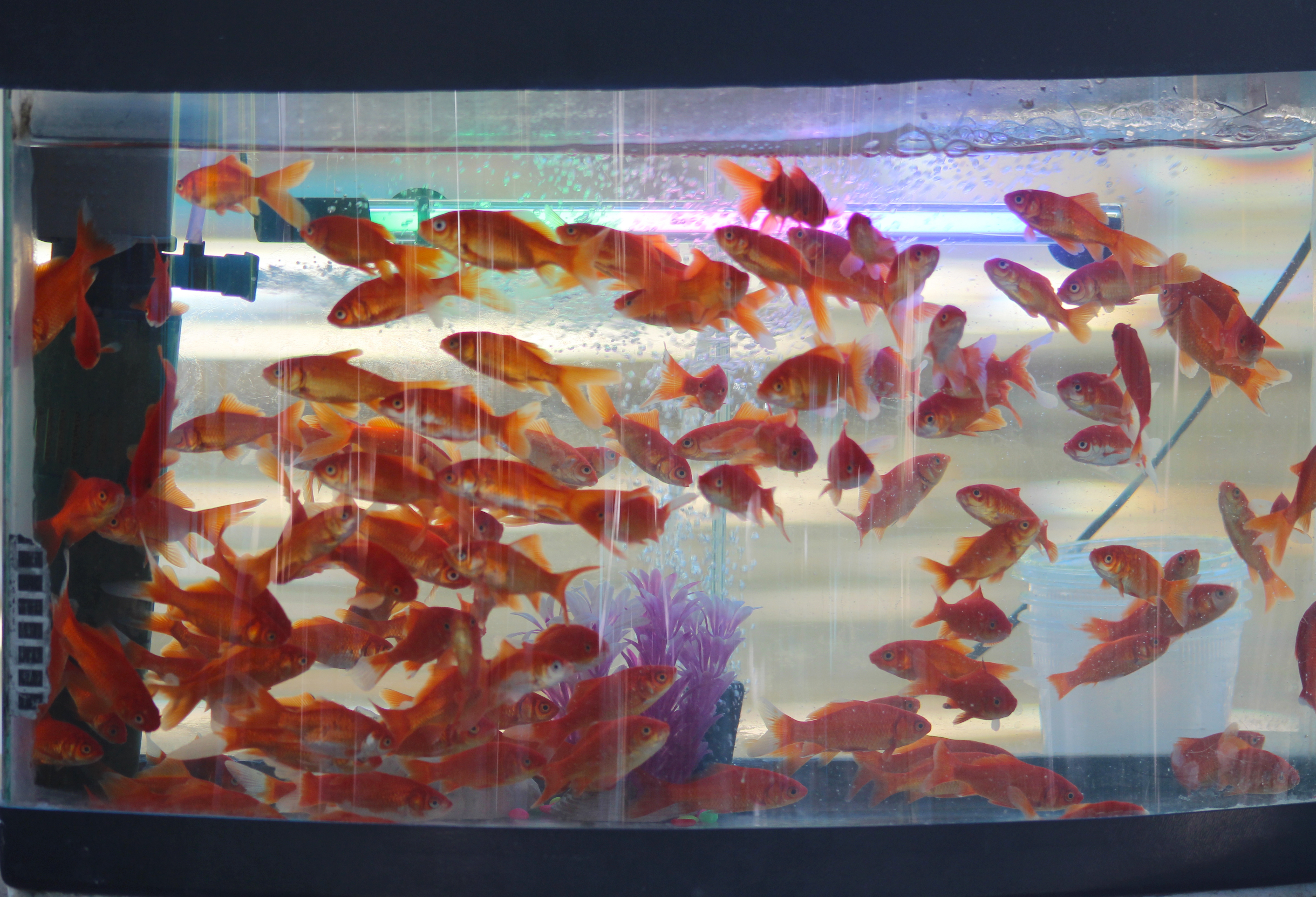 حوض سمك ذهبي في فلسطين